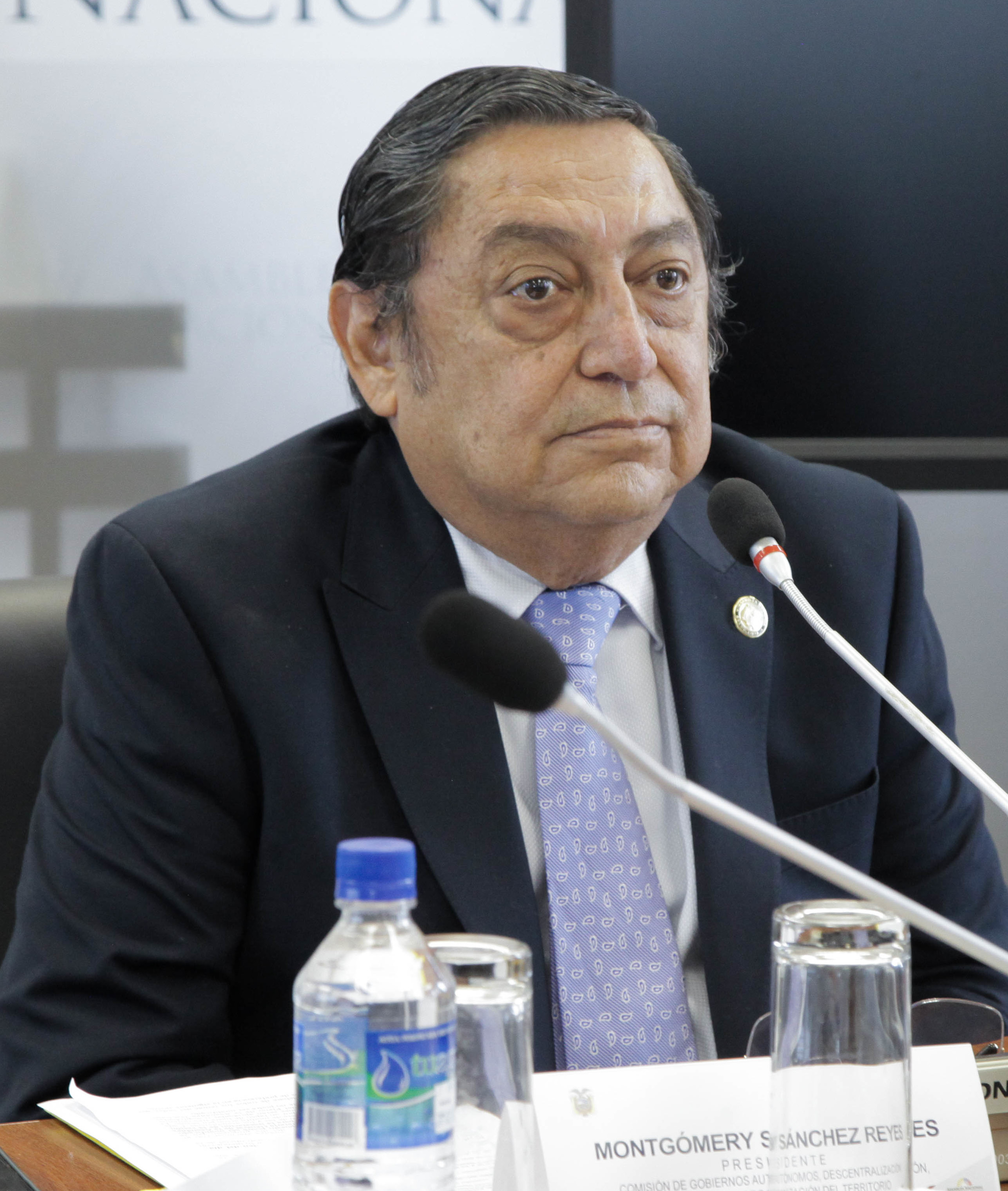 Tema: 1. Proyecto de Ley Orgánica Reformatoria al Código Orgánico de Organización Territorial, Autonomía y Descentralización; presentado por la asambleísta Noralma Zambrano Castro. 2. Proyecto de Ley Orgánica Reformatoria a la Ley Orgánica del Régimen Especial de Galápagos; presentado por la asambleísta Brenda Flor Gil. 3. Comisión general para recibir al señor Javier Alvarado Sevilla, Coordinador General de la Confederación Nacional de Barrios del Ecuador, CONBADE, a fin de recibir sus aportes y propuestas sobre la reforma general al Código Orgánico de Organización Territorial, Autonomía y Descentralización, COOTAD. Fotografías: Sayana Palomeque / Asamblea Nacional 09 de enero de 2017 - Sesión de la Comisión de Gobiernos Autónomos Tema: 1. Proyecto de Ley Orgánica Reformatoria al Código Orgánico de Organización Territorial, Autonomía y Descentralización; presentado por la asambleísta Noralma Zambrano Castro. 2. Proyecto de Ley Orgánica Reformatoria a la Ley Orgánica del Régimen Especial de Galápagos; presentado por la asambleísta Brenda Flor Gil. 3. Comisión general para recibir al señor Javier Alvarado Sevilla, Coordinador General de la Confederación Nacional de Barrios del Ecuador, CONBADE, a fin de recibir sus aportes y propuestas sobre la reforma general al Código Orgánico de Organización Territorial, Autonomía y Descentralización, COOTAD. Fotografías: Sayana Palomeque / Asamblea Nacional